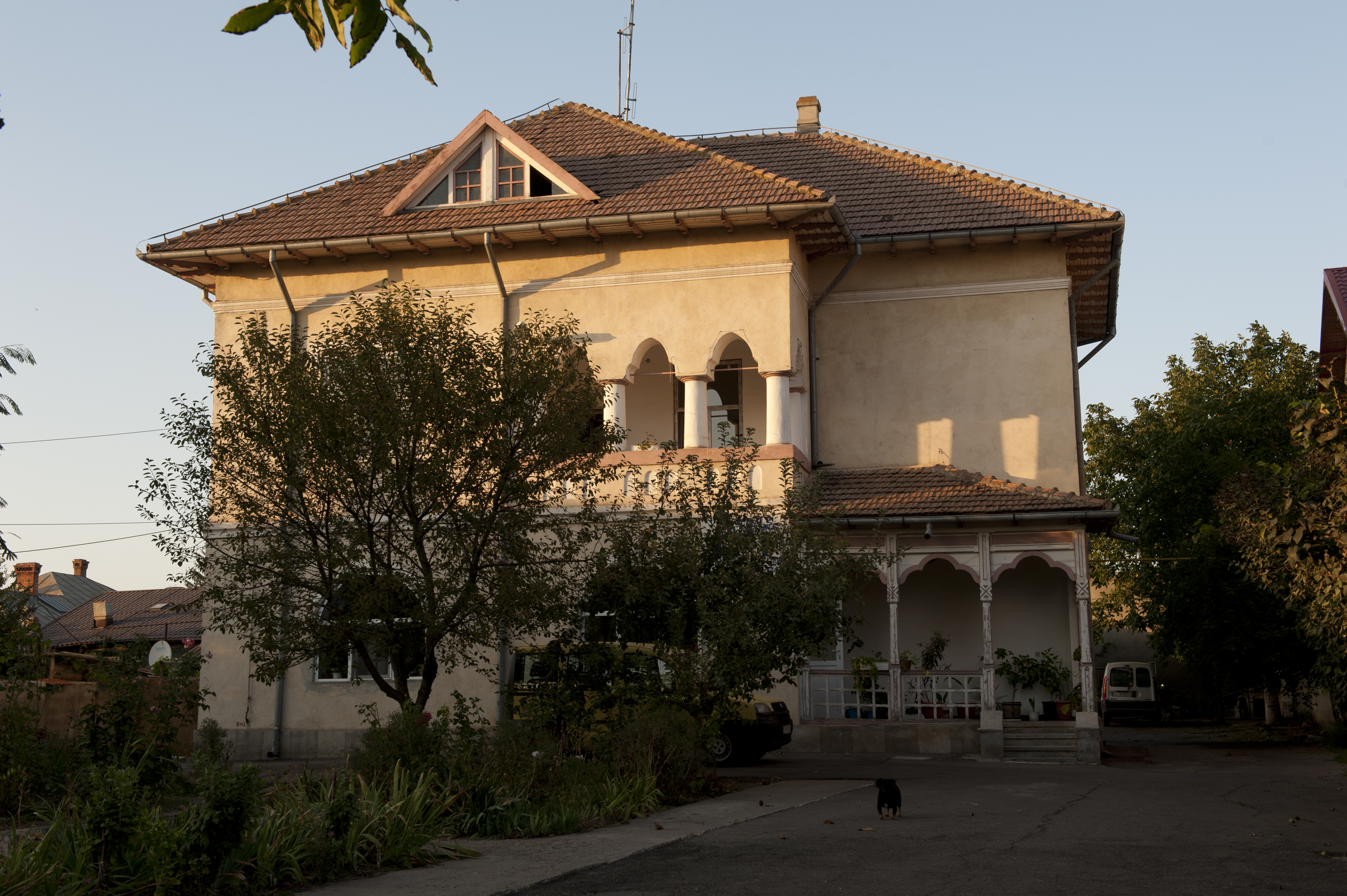 Str. Independentei nr. 43, Casa, construitã la sf. sec. XIX, fost spital TBC, Sectia de Drumuri Nationale Calarasi